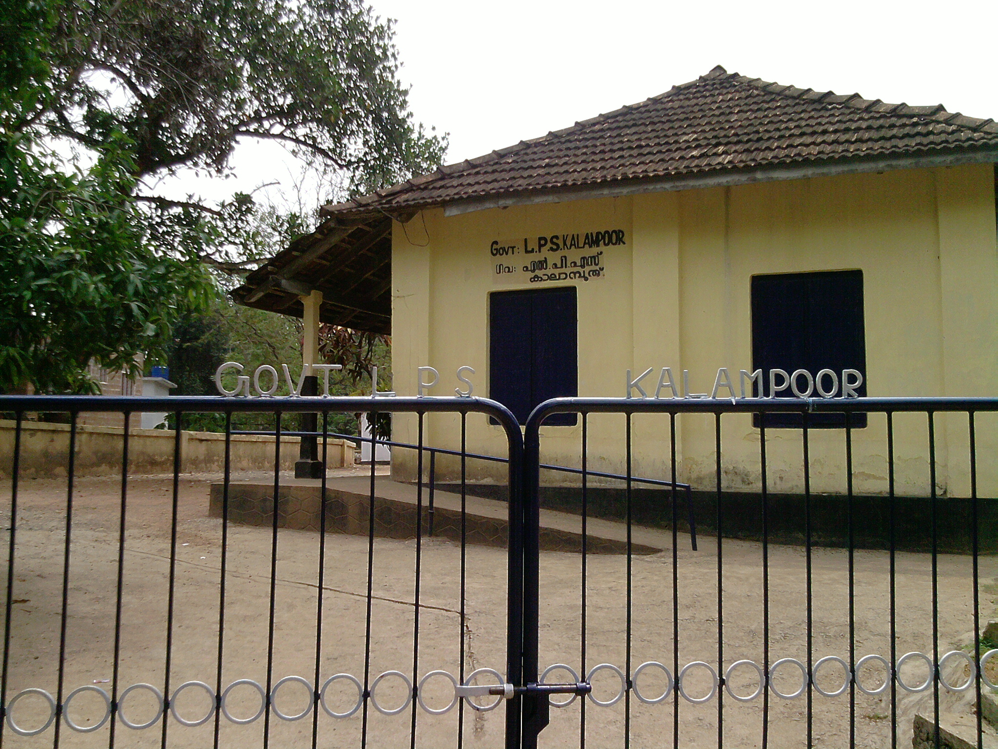 ഗവണ്മെന്റ്‌‌ എൽ പി സ്കൂൾ കാലാമ്പൂര്